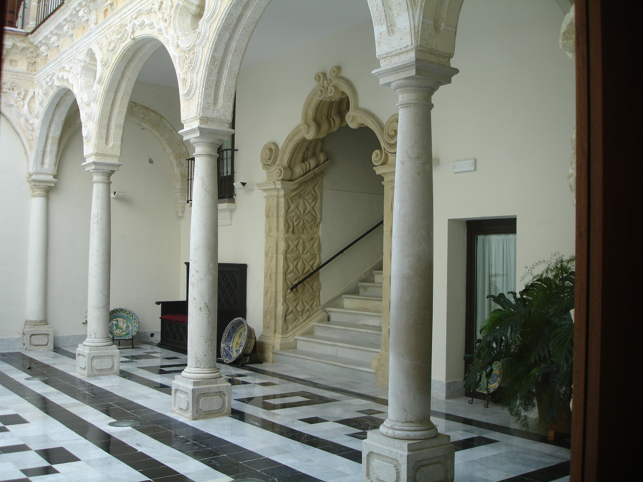 Escalera del Patio principal del Palacio de Bertemati, Jerez de la Frontera (Spain).